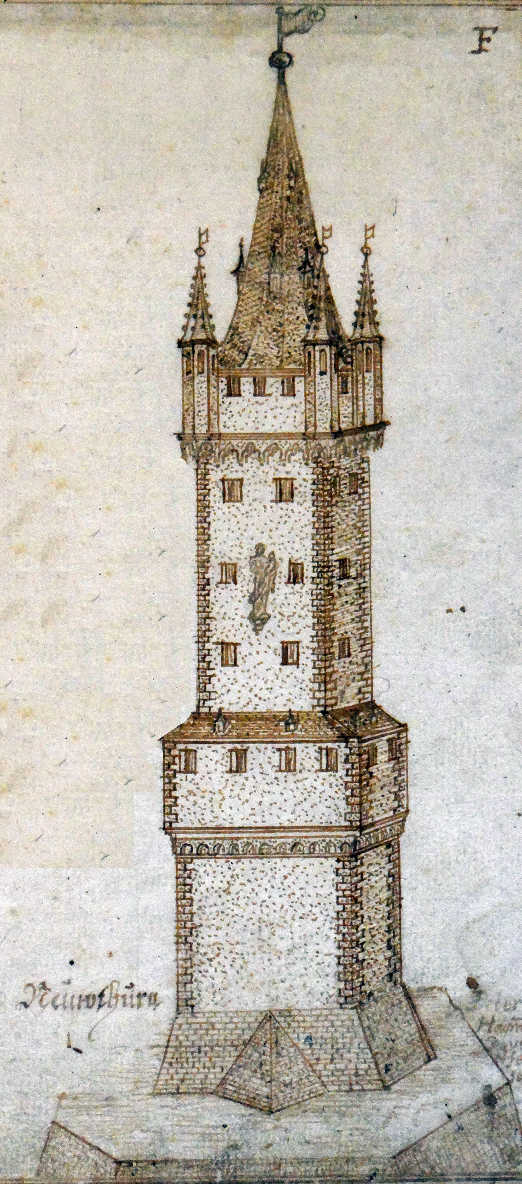 Neuturm, Worms. Zeichnung von Peter Hamman. Stadtarchiv Worms, Abt. 1B, Nr. 48